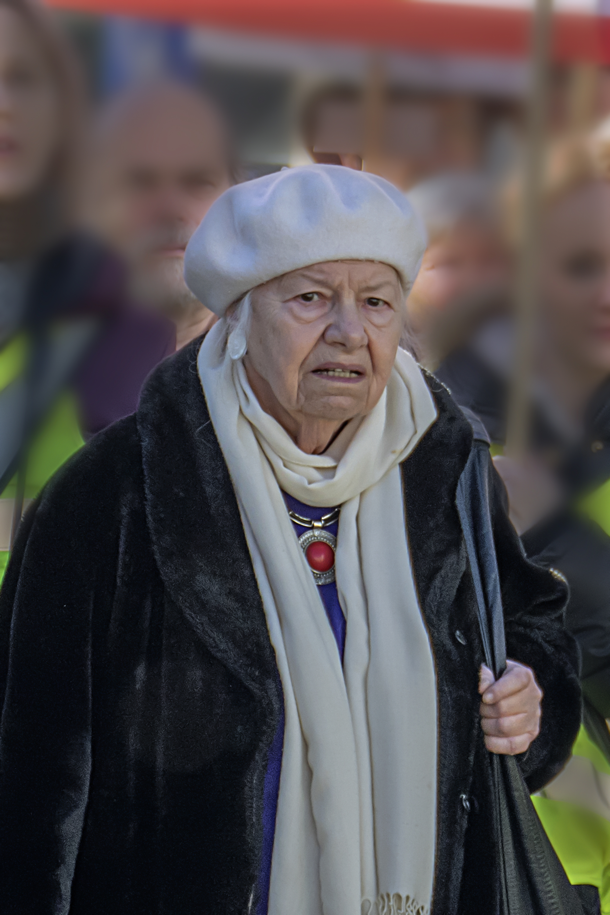 Laura von Wimmersperg bei der Gelbwestendemo der Bewegung "Aufstehen" der Initiatorin Sahra Wagenknecht am 16. Februar 2019 in Berlin, Potsdamer Platz